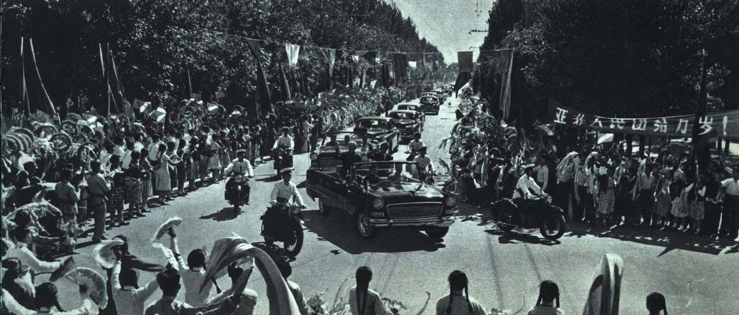 1964-11 1964年9月29日 刚果总统阿方斯·马桑巴-代巴访华 Alphonse Massamba-Débat